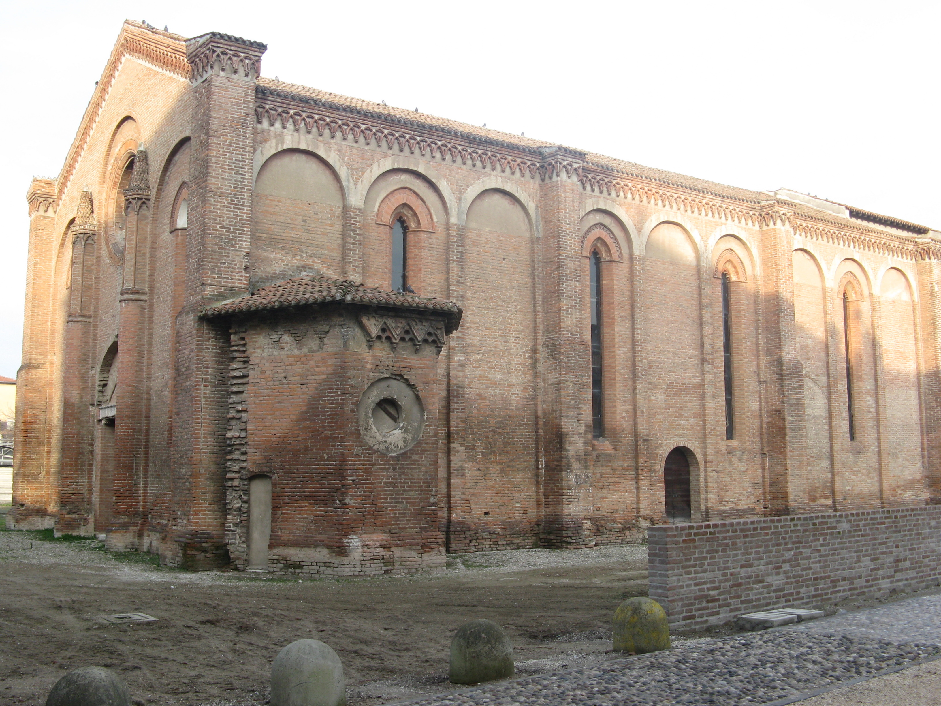 Chiesa in stile romanico ora sconsacrata e adibita a sala riunioni.